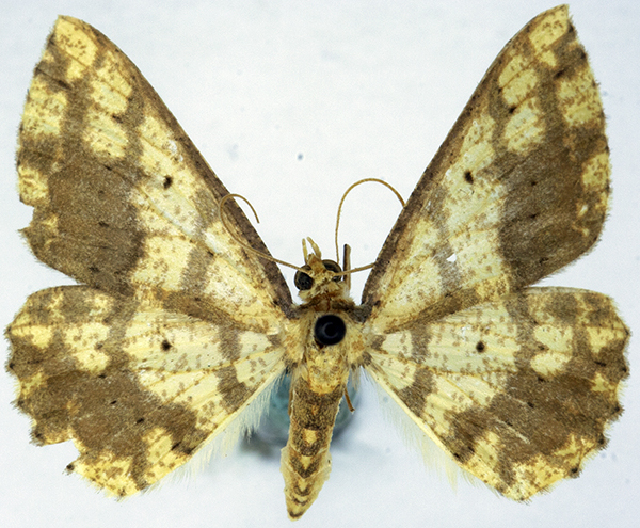 Synegia varians commaculata